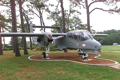 OV-10 Bronco